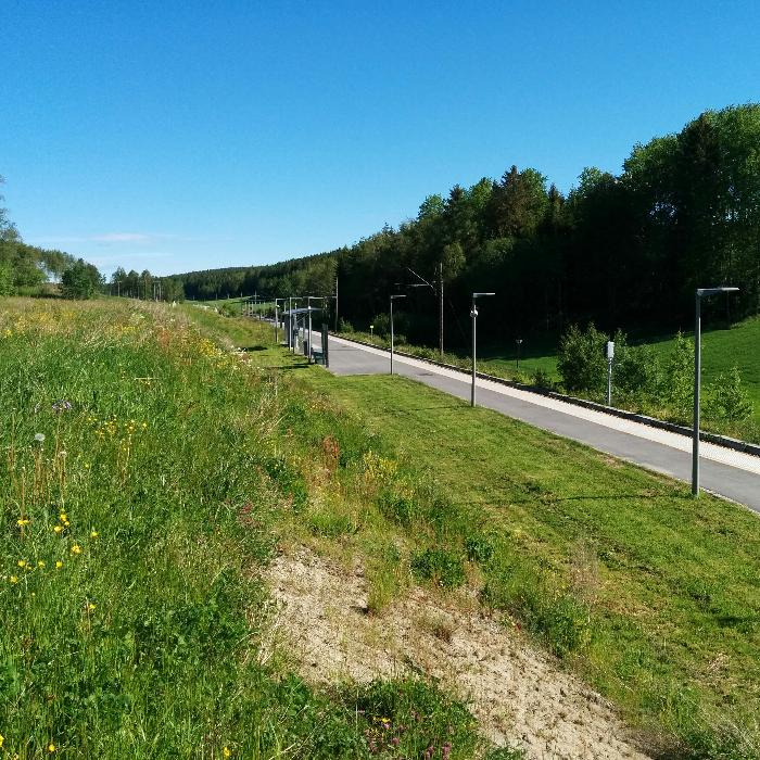 Den nye togstasjonen på Knapstad.